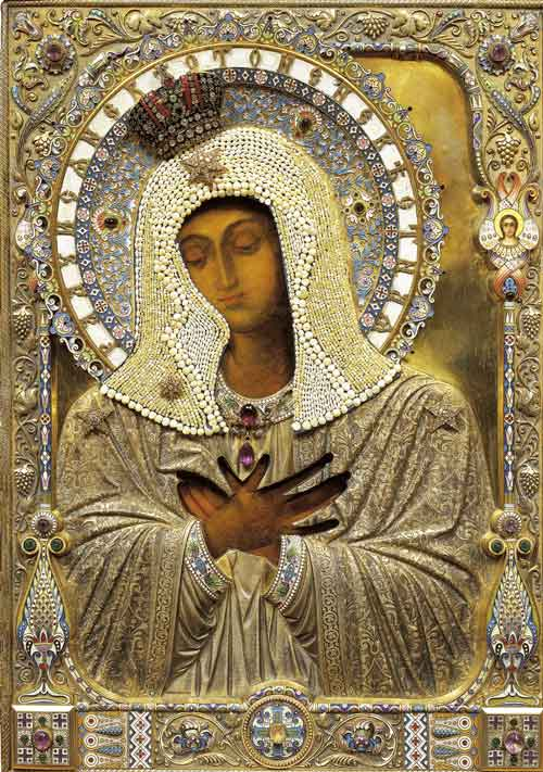 Серафимо-Дивеевская икона Божией Матери "Умиление", перед которой скончался преподобный Серафим Саровский, Вторая половина XVIII века. Дерево, левкас, масло. Оклад: начало XX века.